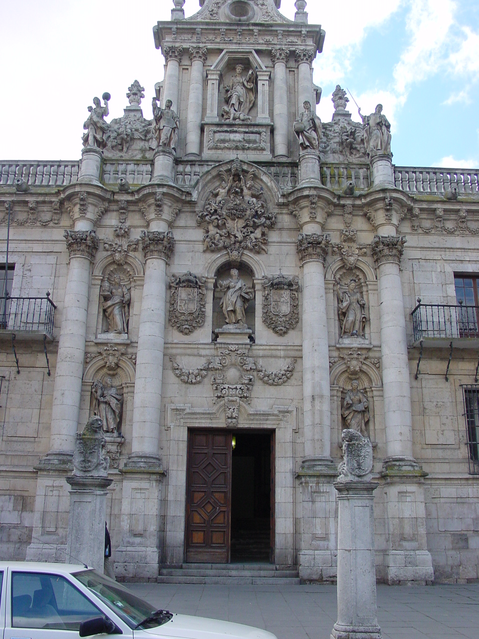 Fachada de la Universidad de Valladolid. Septiembre 2005.